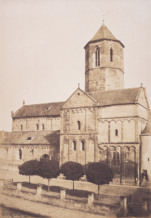 Rosheim, Church